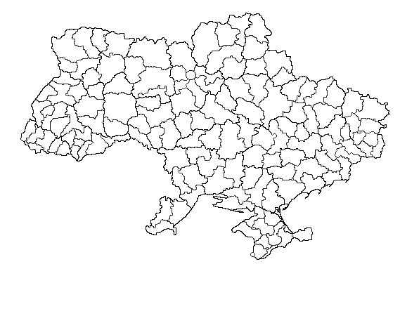 Нові райони України (з 2020)